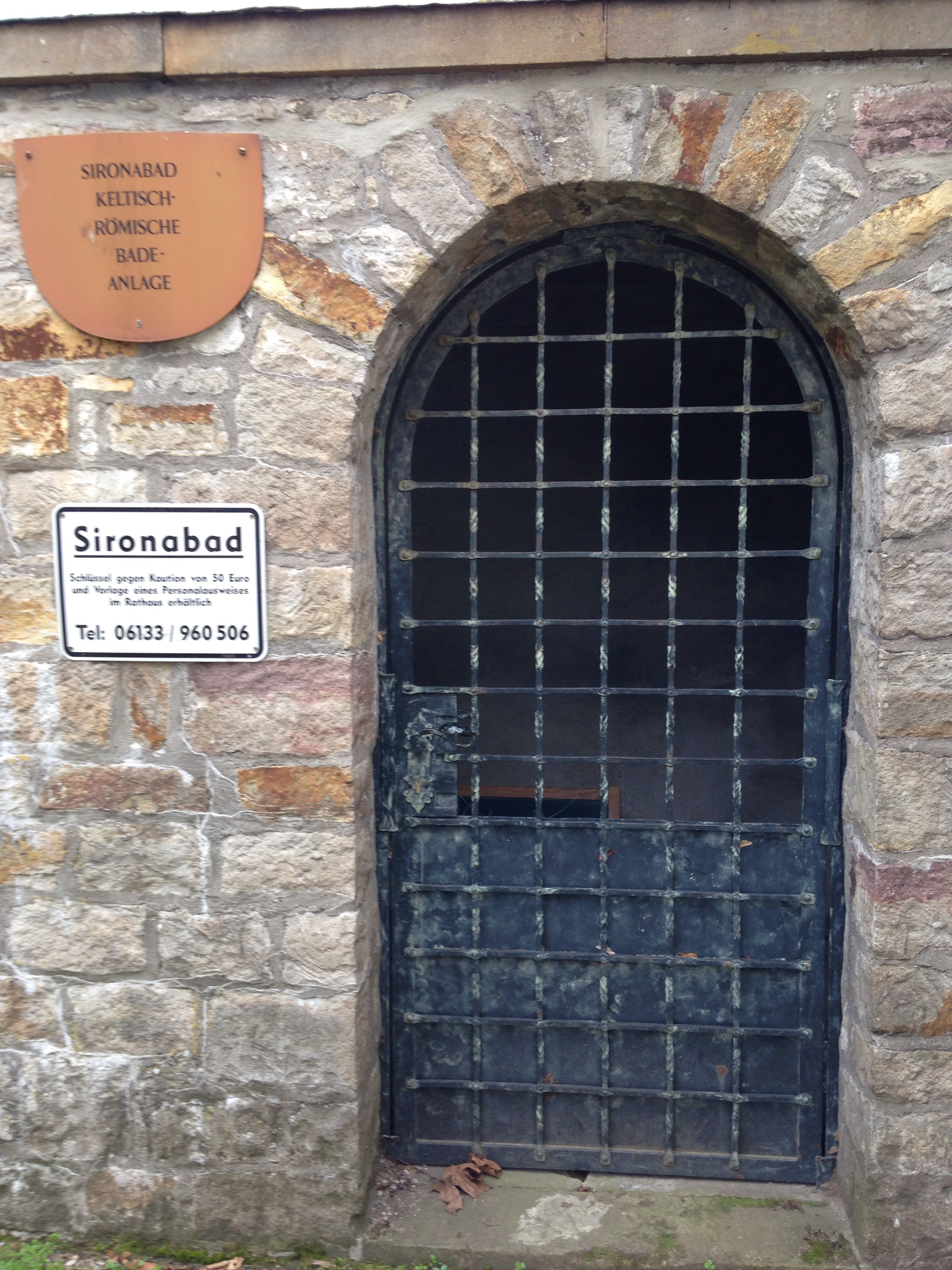 Sironabad